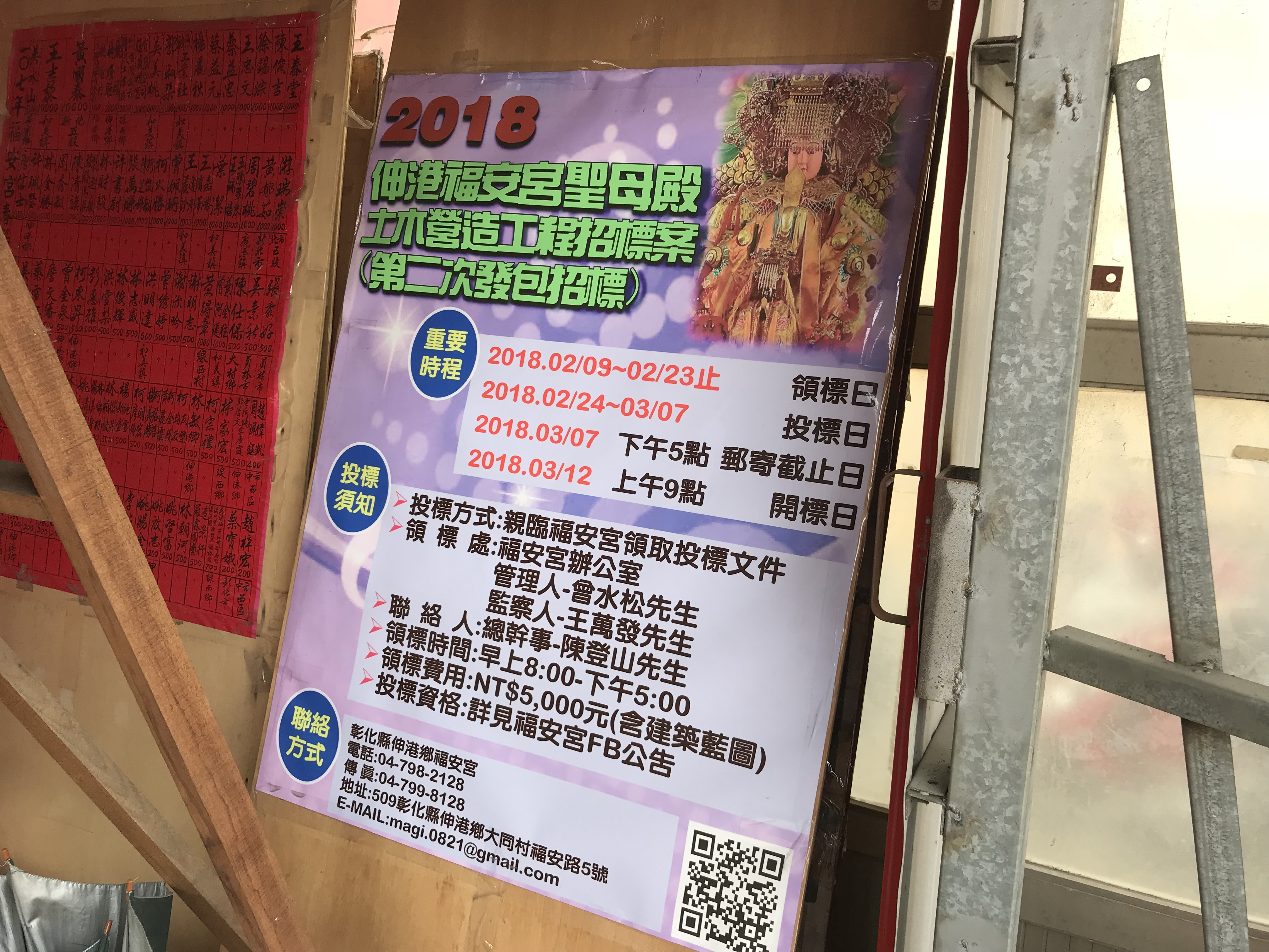 伸港福安宫招標工程告示